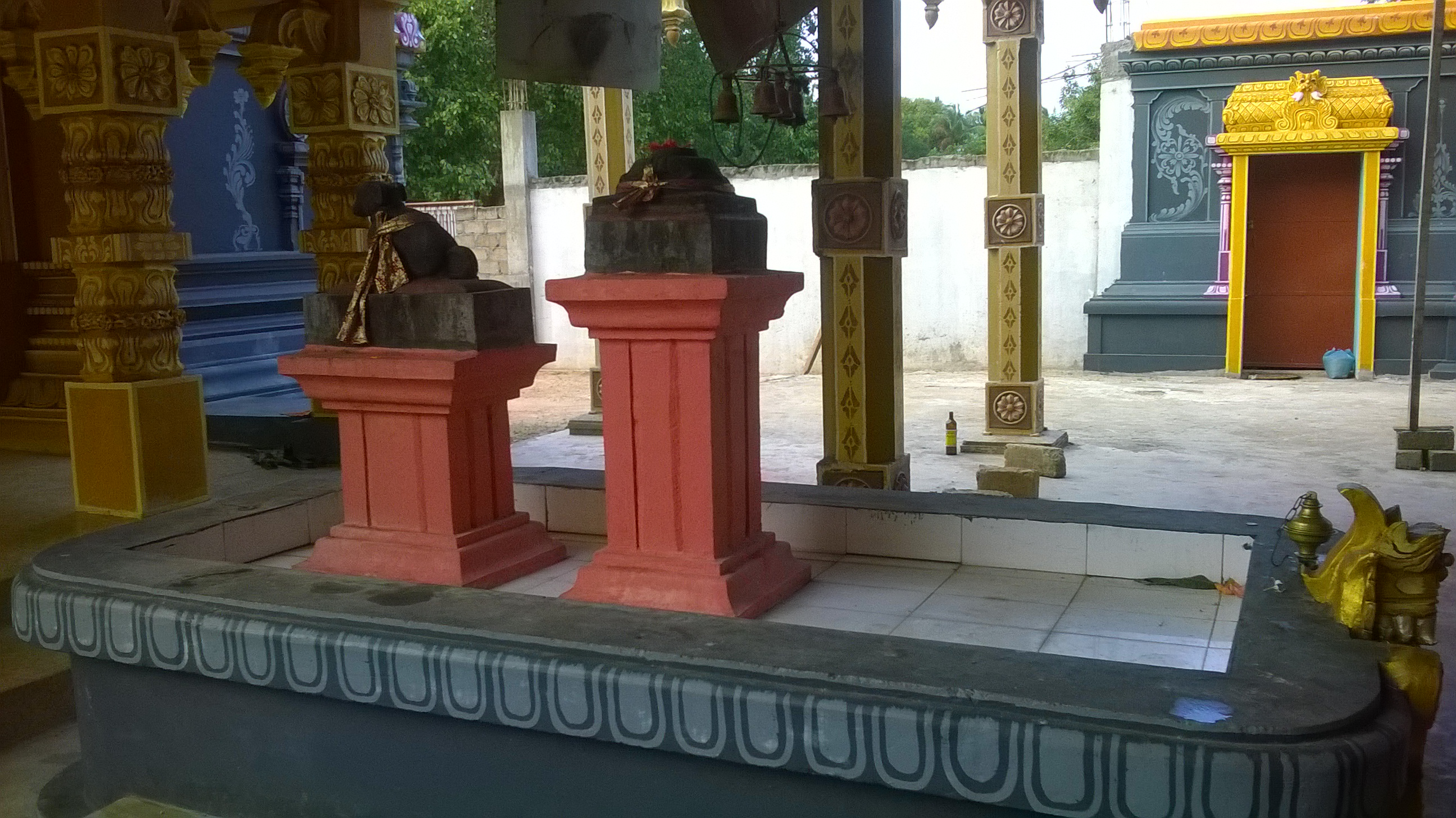 மூலாதார கணபதியும் பலிபீடமும்